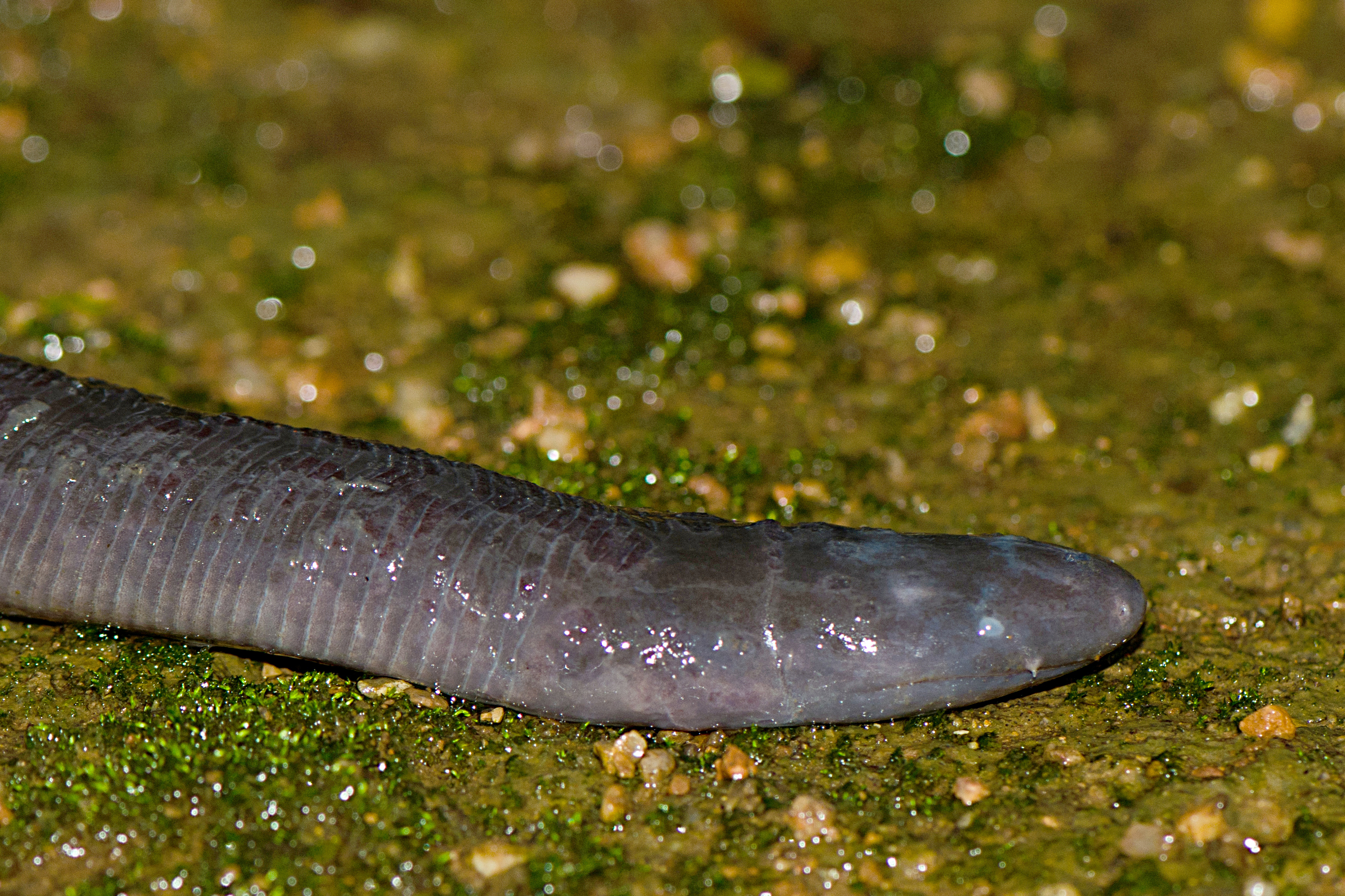 കുവേഷി,കര്‍ണ്ണാടക